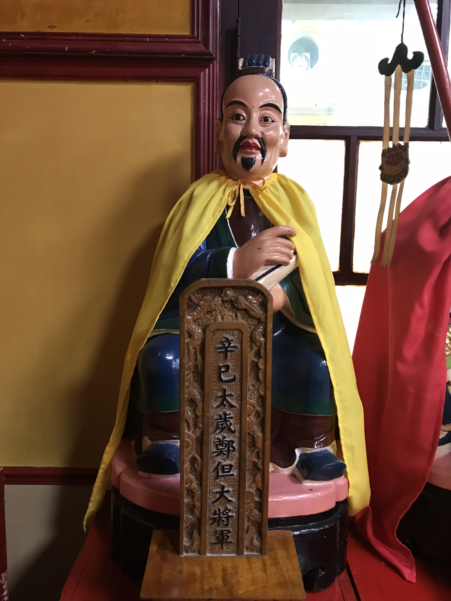 辛巳太歲鄭但大將軍神像